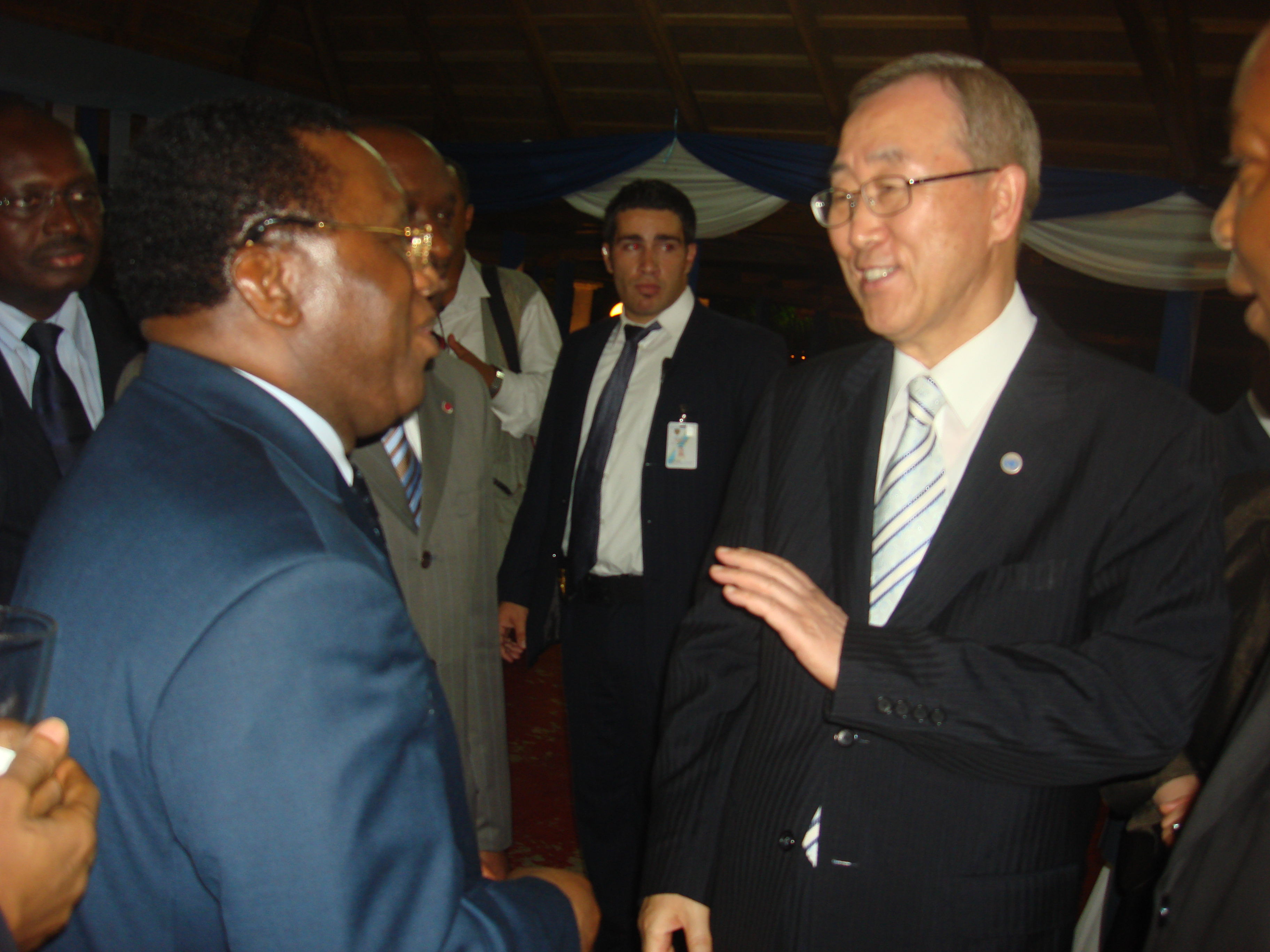 Le Secrétaire Général des Nations Unies, Ban Ki-moon , avec le Ministre Ivoirien des Affaires étrangères, Youssouf Bakayoko.